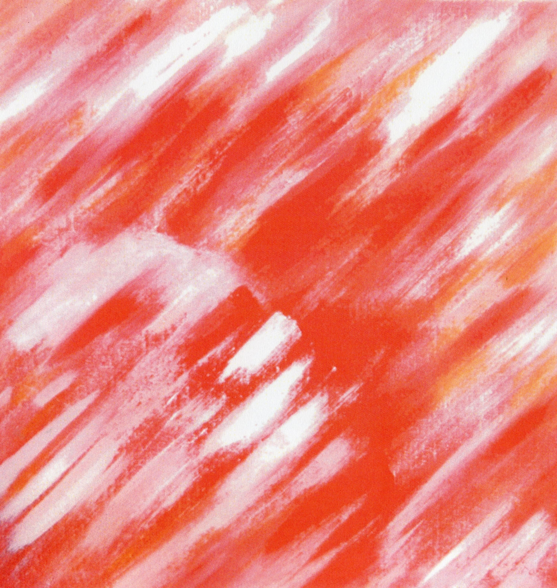 Acrylic pe pânză denumit „Grădina Eden II” - 60-60, 2005